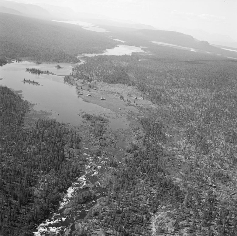 Från Peuraure kommer Pärlälven till Karats. Innan den faller in i sjön vidgar den sig till ett sel - Lillselet. Foto mot väster. Motiv: Karats Nyckelord: Flygbilder Kategori: Fjällmiljö, Flodlandskap Från Peuraure kommer Pärlälven till Karats. Innan den faller in i sjön vidgar den sig till ett sel - Lillselet. Foto mot väster.